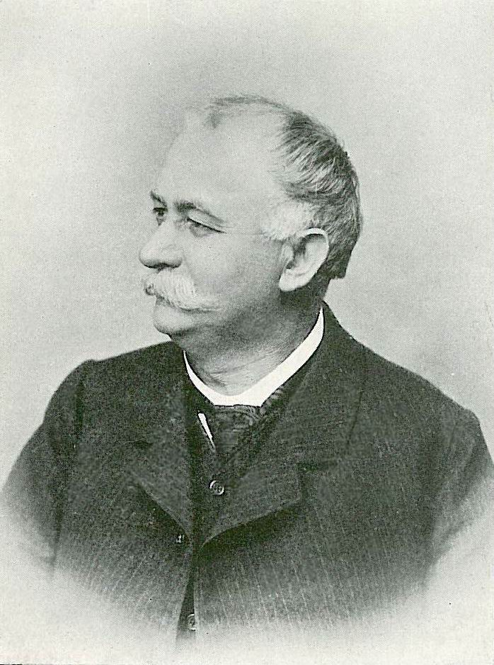 August Schneider (geb. 20.10.1851- gest. 25.06.1929), „Erster Bürgermeister“ von Kattowitz (Amtszeit von 1890 bis 1902), Geheimer Justizrat des Kaiser Wilhelm II., Ehrenbürger der Stadt Kattowitz, Oberschlesien.